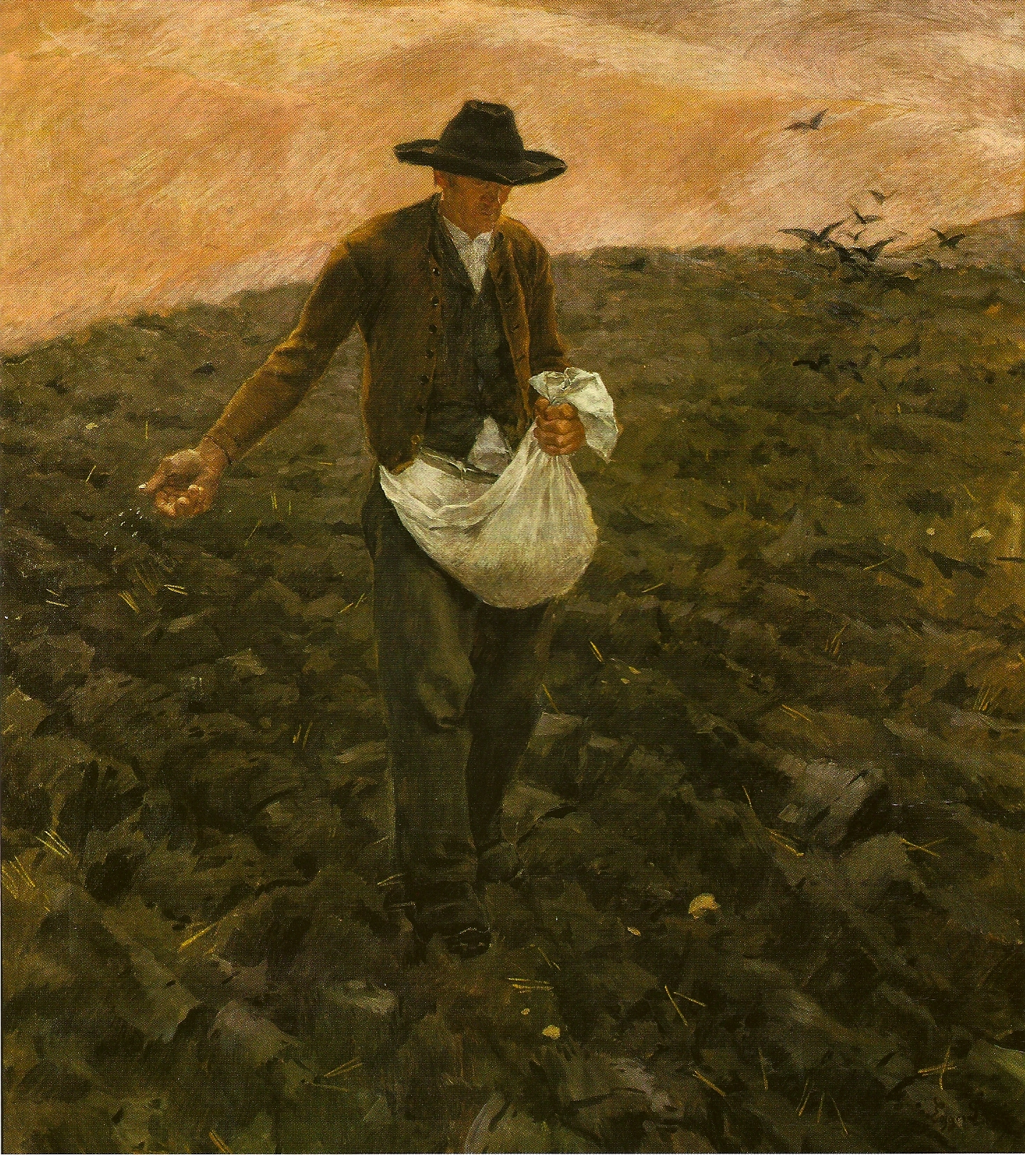 Erste Fassung in Ganzfigur